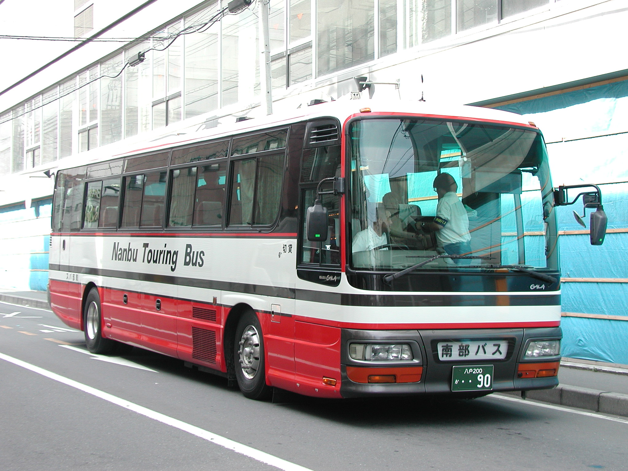 南部バス観光貸切塗装（いすゞ・ガーラ：KC-LV782R1）：うみねこ号臨時運用 八日町（中央通り）バス停付近にて この日、通常は宮城交通担当便の予定だったが、仙台からの便での到着が遅れていたためなのか、折り返しによる車両のやりとりがつかなかったことから、急遽南部バスが臨時で担当便を変更して運用された。